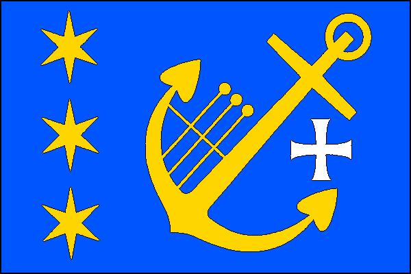 Vlajka obce Chvatěruby